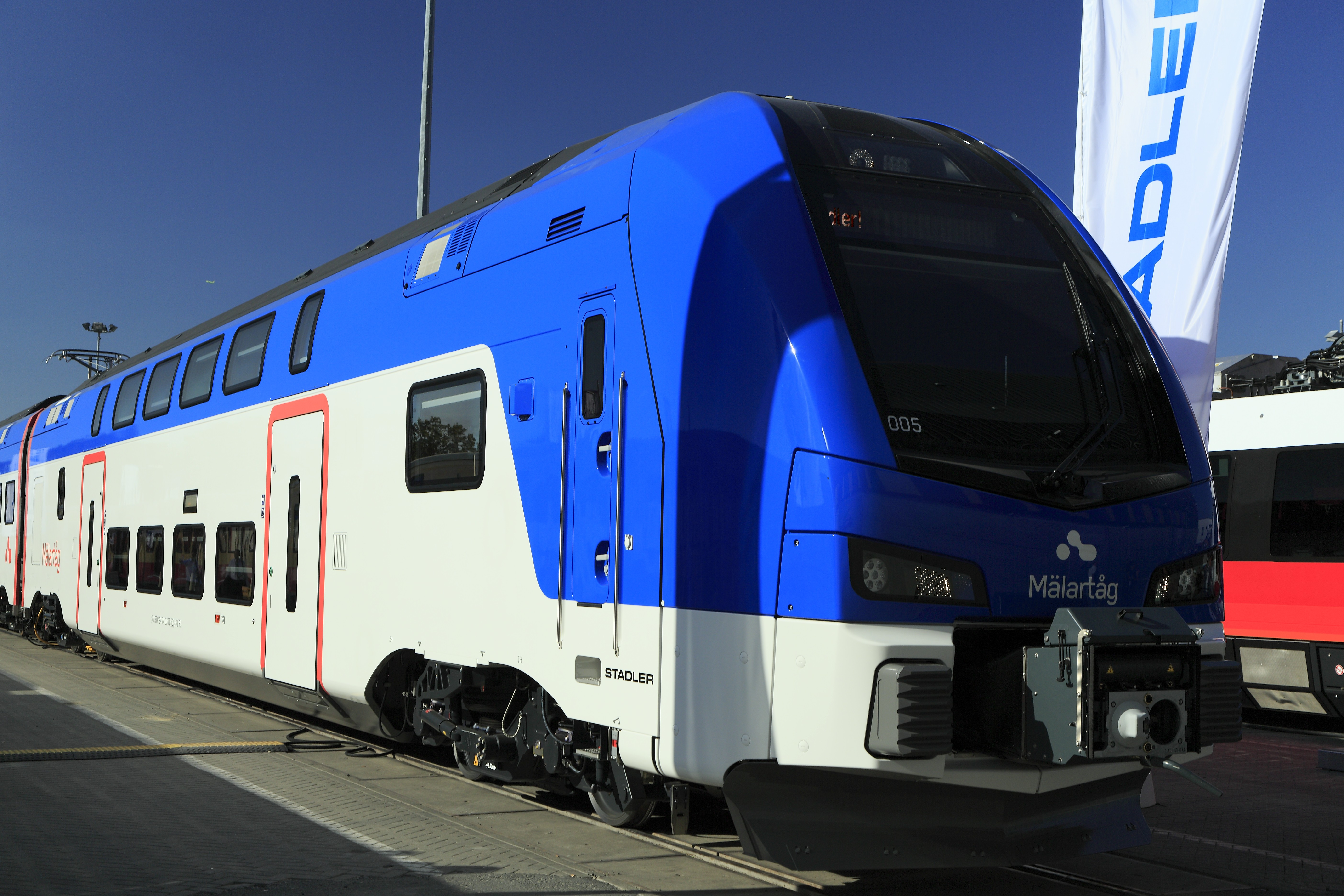 Vierteilige Doppelstockeinheit für Schweden, Fahrzeughalter wird das Leasingunternehmen Transitio. Eingesetzt werden sollen die Einheiten auf dem Mälardalen-Netz westlich von Stockholm. Die Einheiten nutzen das schwedische Fahrzeugumgrenzungsprofil gut aus, sie sollen mit Temperaturen bis –40°C und Schneehöhen bis 80 cm klarkommen.